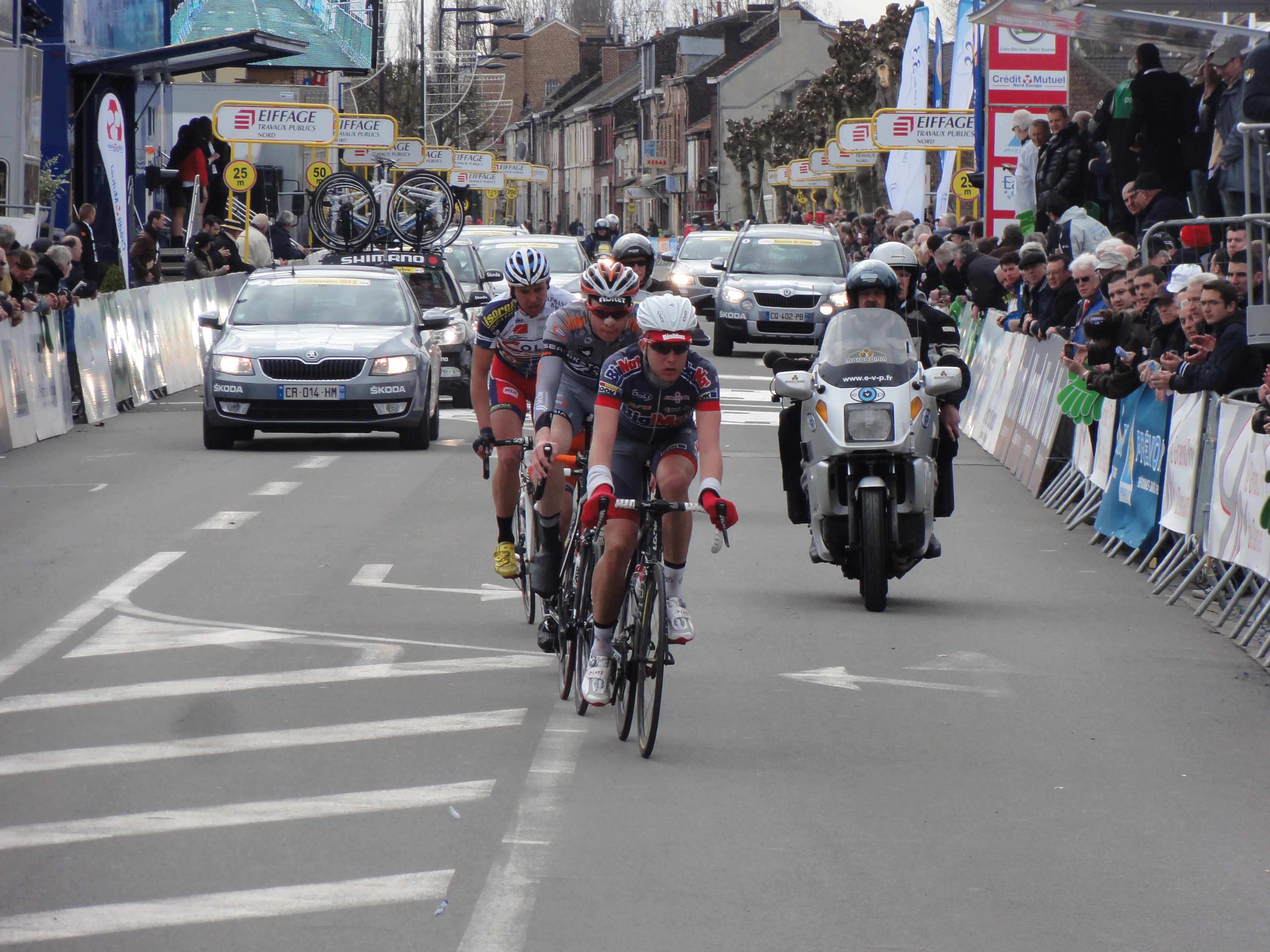 Reportage photographique réalisé le mardi 11 avril 2013 durant l'édition 2013 du Grand Prix de Denain à Denain, Nord, Nord-Pas-de-Calais, France. Depicted people: Sven Jodts, Vegard Stake Laengen and Flavien Dassonville